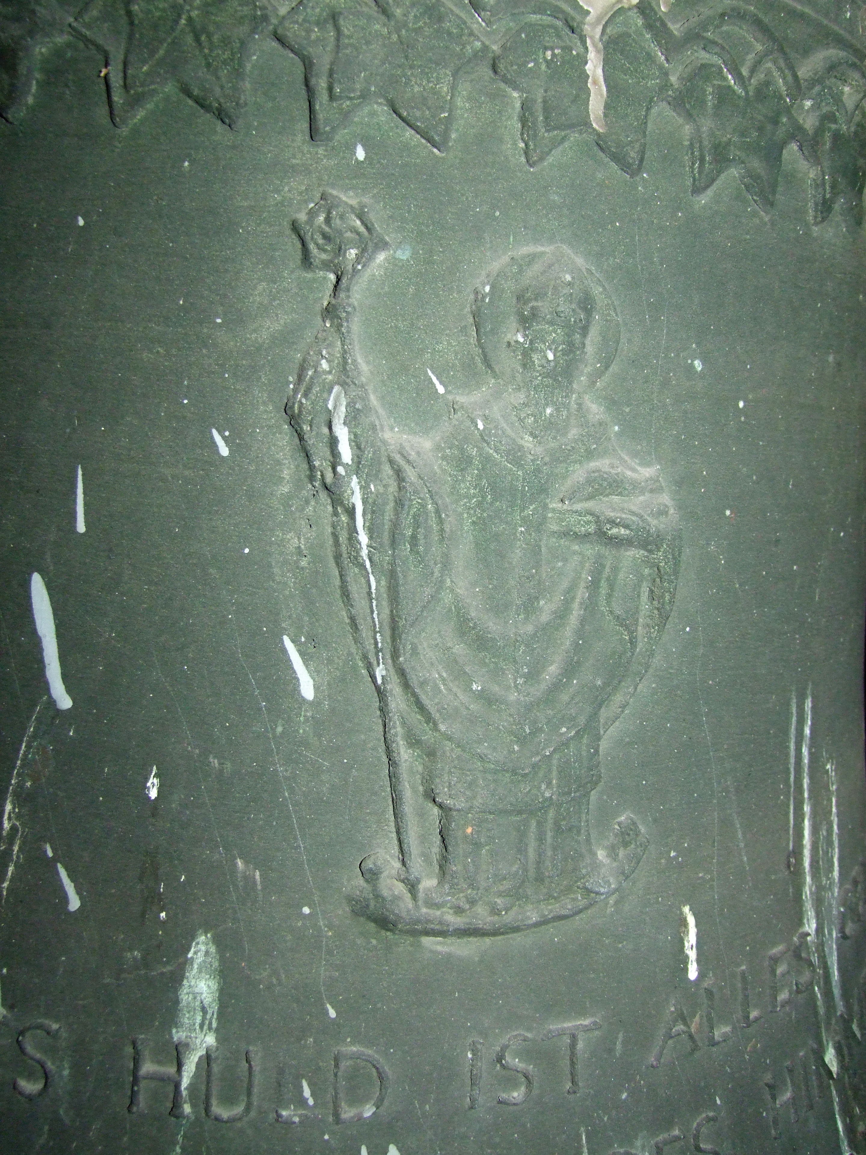 St. Ulrich, Amendingen - OpenStreetMap (Info) St. Ulrichsglocke in St. Ulrich, Amendingen